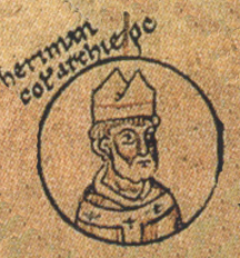 Herman II (Archbishop of Cologne)